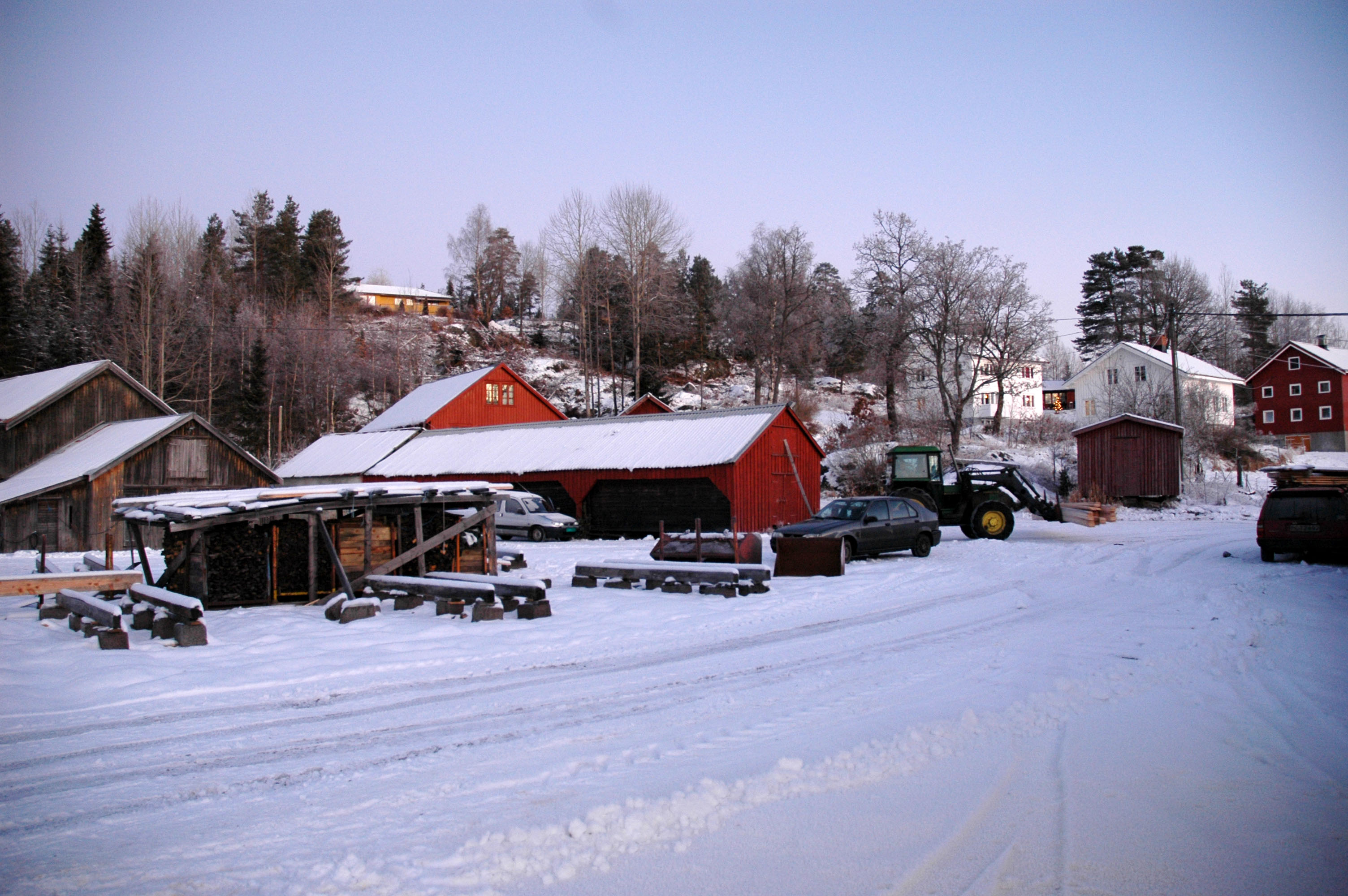 Haukenes Sag